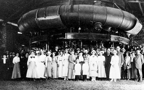 Från invigningen av masugnen i Oxelösund den 28 juni 1917.